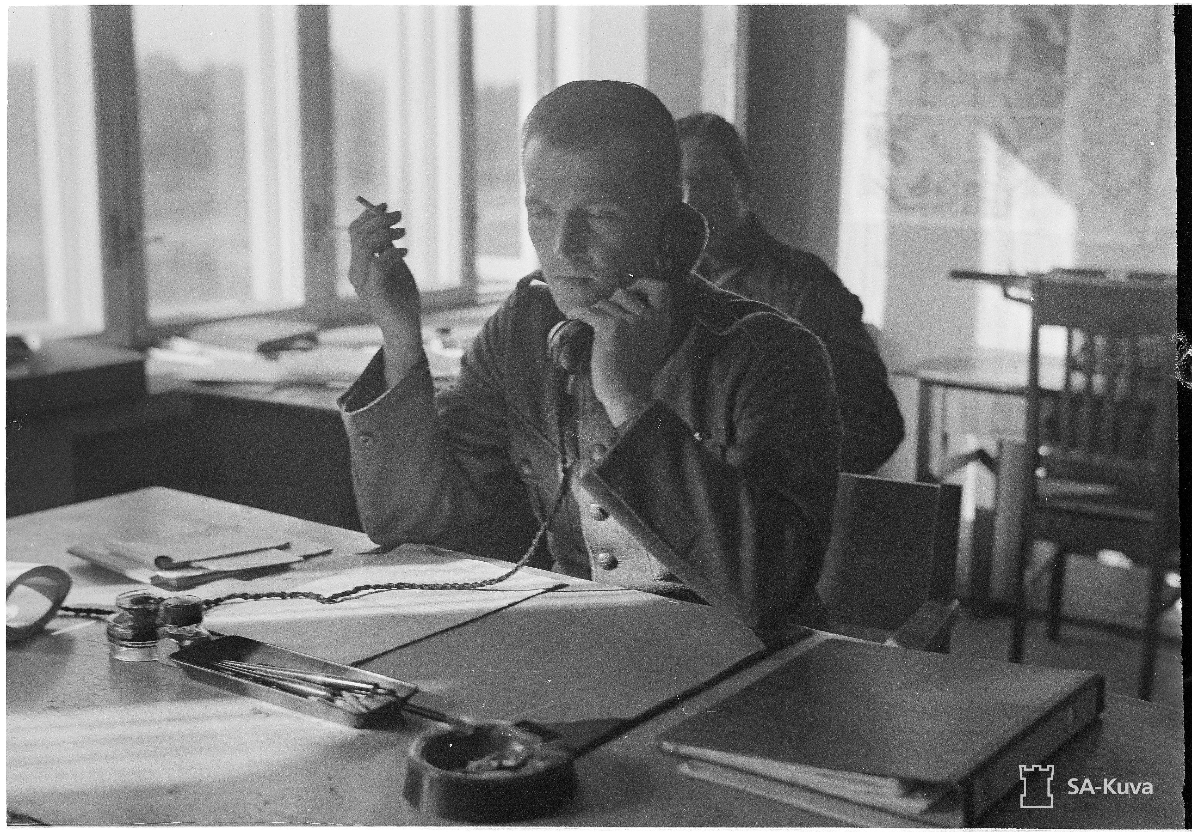 Komppanian vääpeli kersantti Kataja (autokomppania, Helsinki)